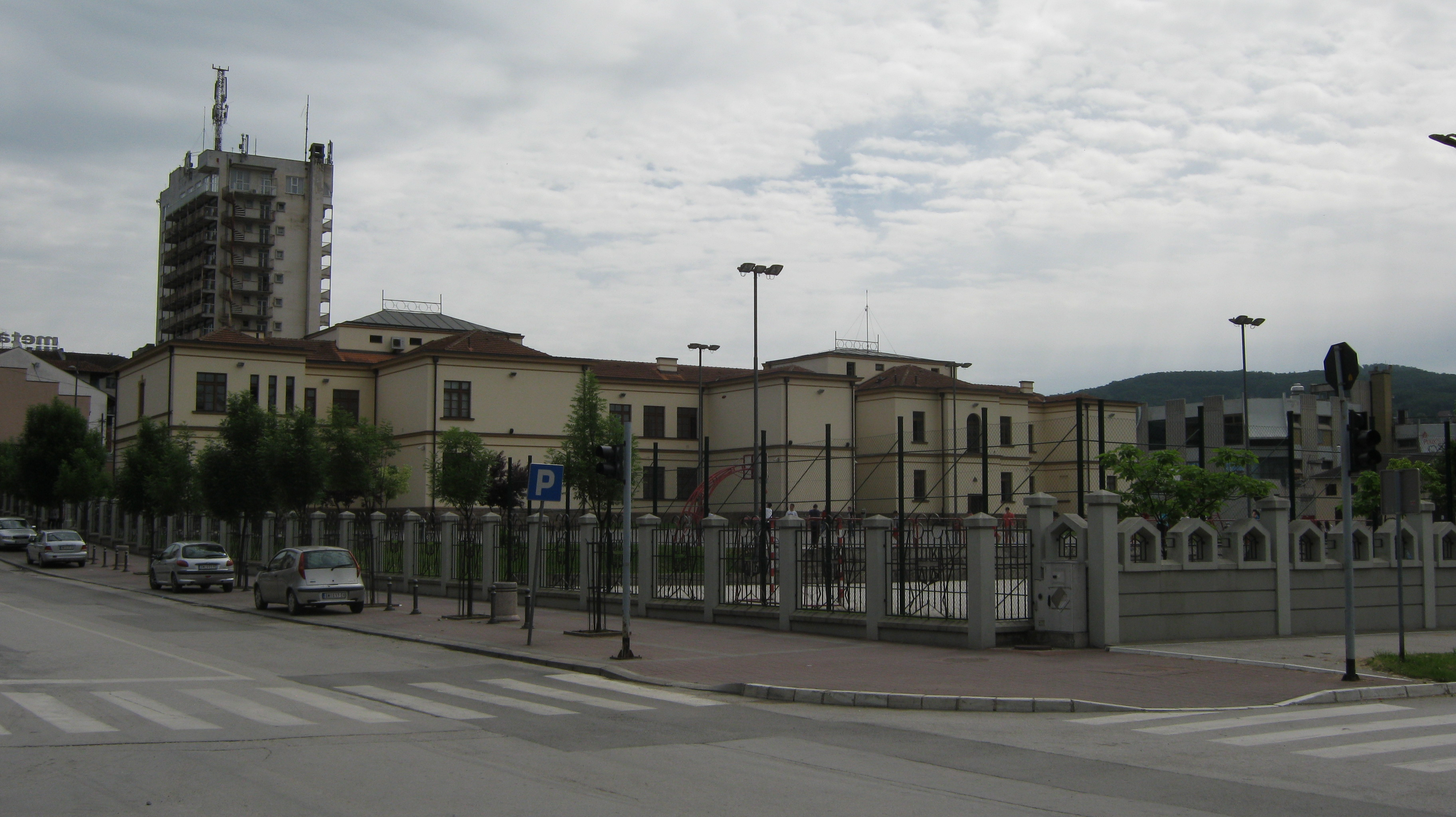 Гимназија „Таковски устанак“ је гимназија, једна од три средње школе у општини Горњи Милановац. Основана је 1879. године, а садашње име носи од 9. маја 1974. године. Налази се у Улици Милоша Великог број 11.